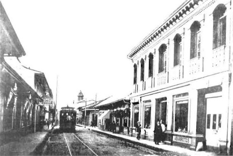 «Calle de San José de Costa Rica en el decenio del diez, período en cual Luis Llach vivió en dicha ciudad. Reproducción tomada del Archivo Nacional de Costa Rica No. 2086. Serie Fotográficas, Album 4.»